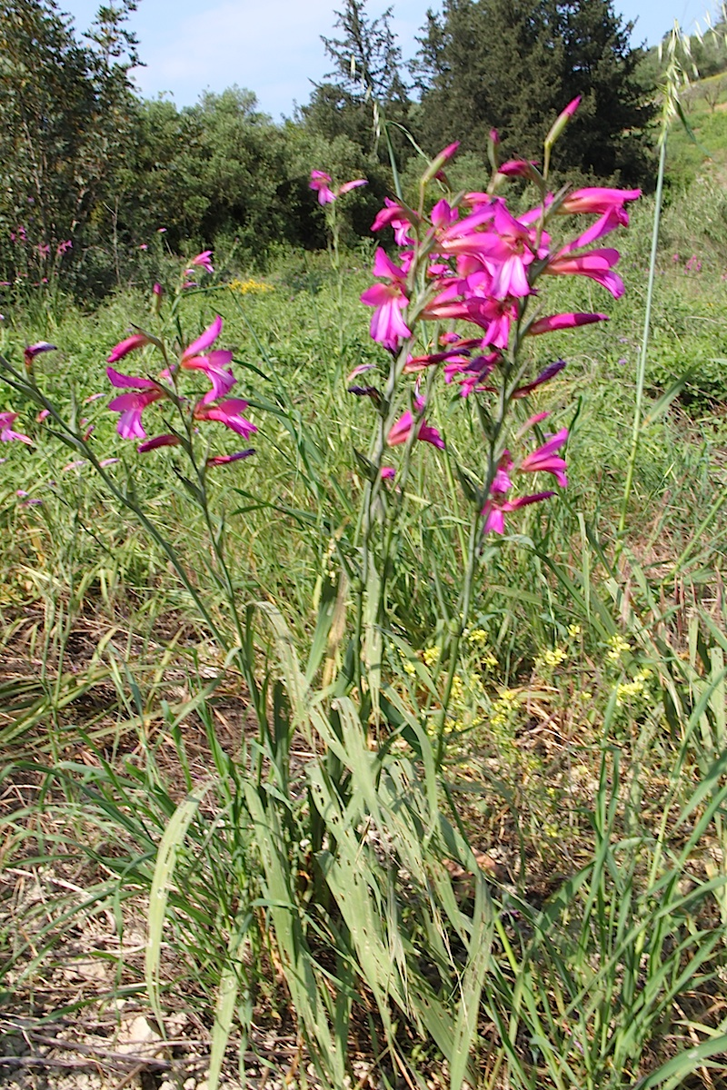 Gladiolus italicus